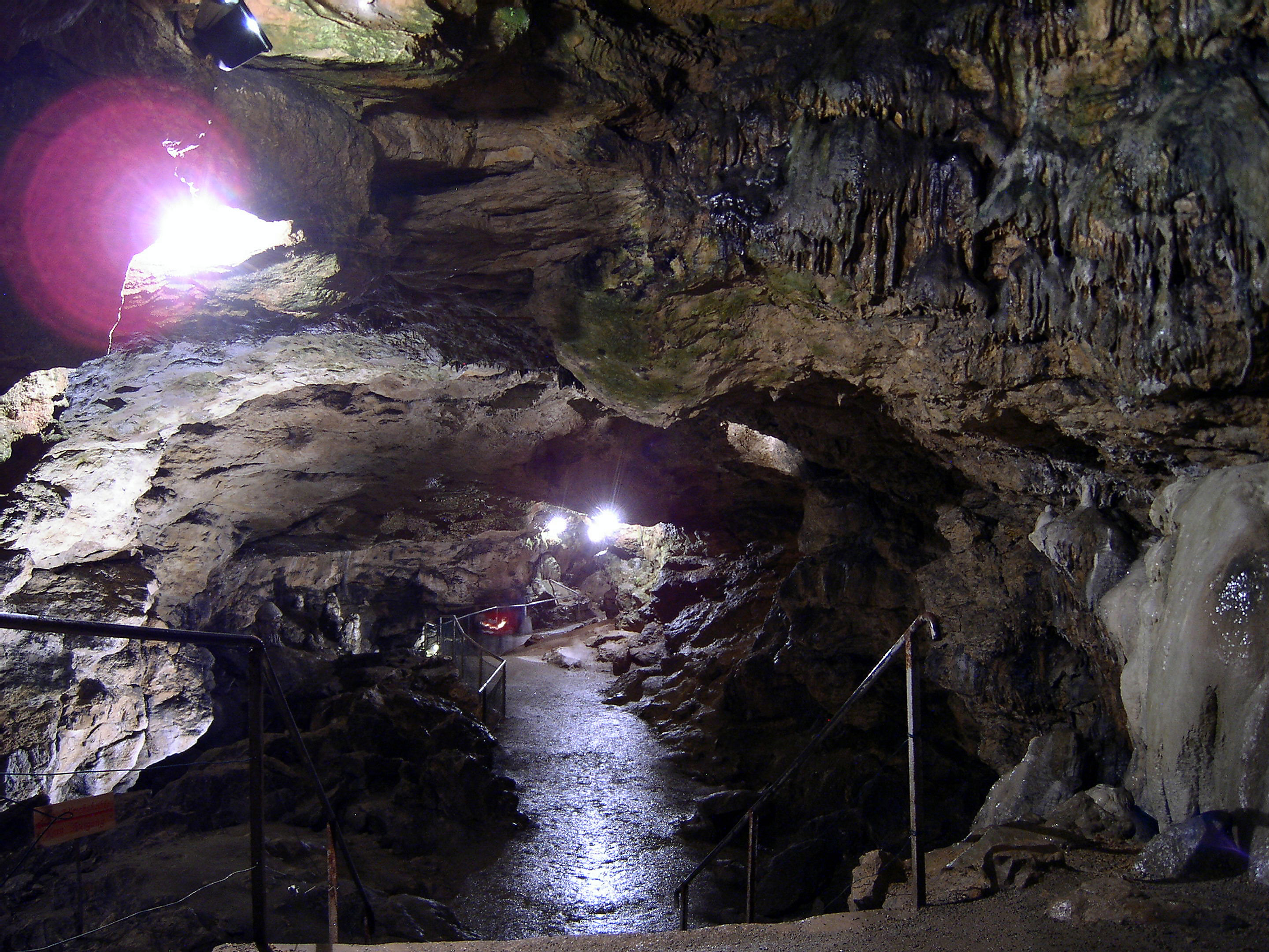 Nebelhoehle_2006